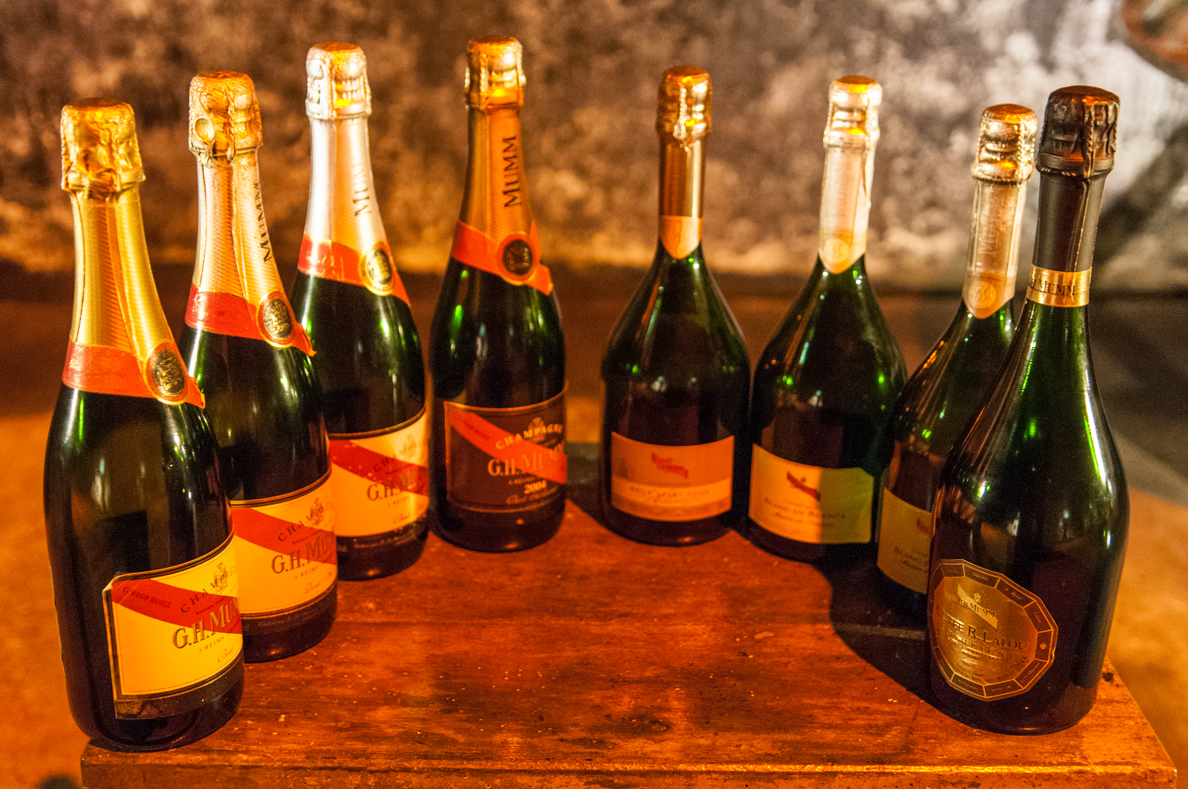 G. H. Mumm